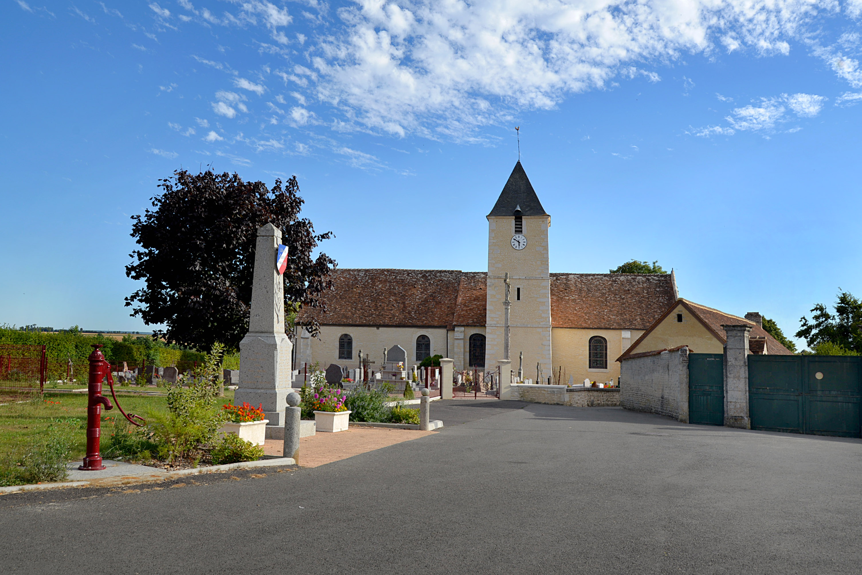 Goulet (Orne)